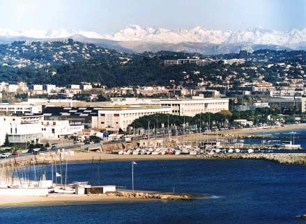 Photo du bâtiment historique du boulevard du Midi, siège de l'industrie aéronautique et spatiale, zone industrielle de la Frayère dans le quartier de La Bocca à Cannes, département des Alpes-Maritimes, région Provence-Alpes-Côte d'Azur